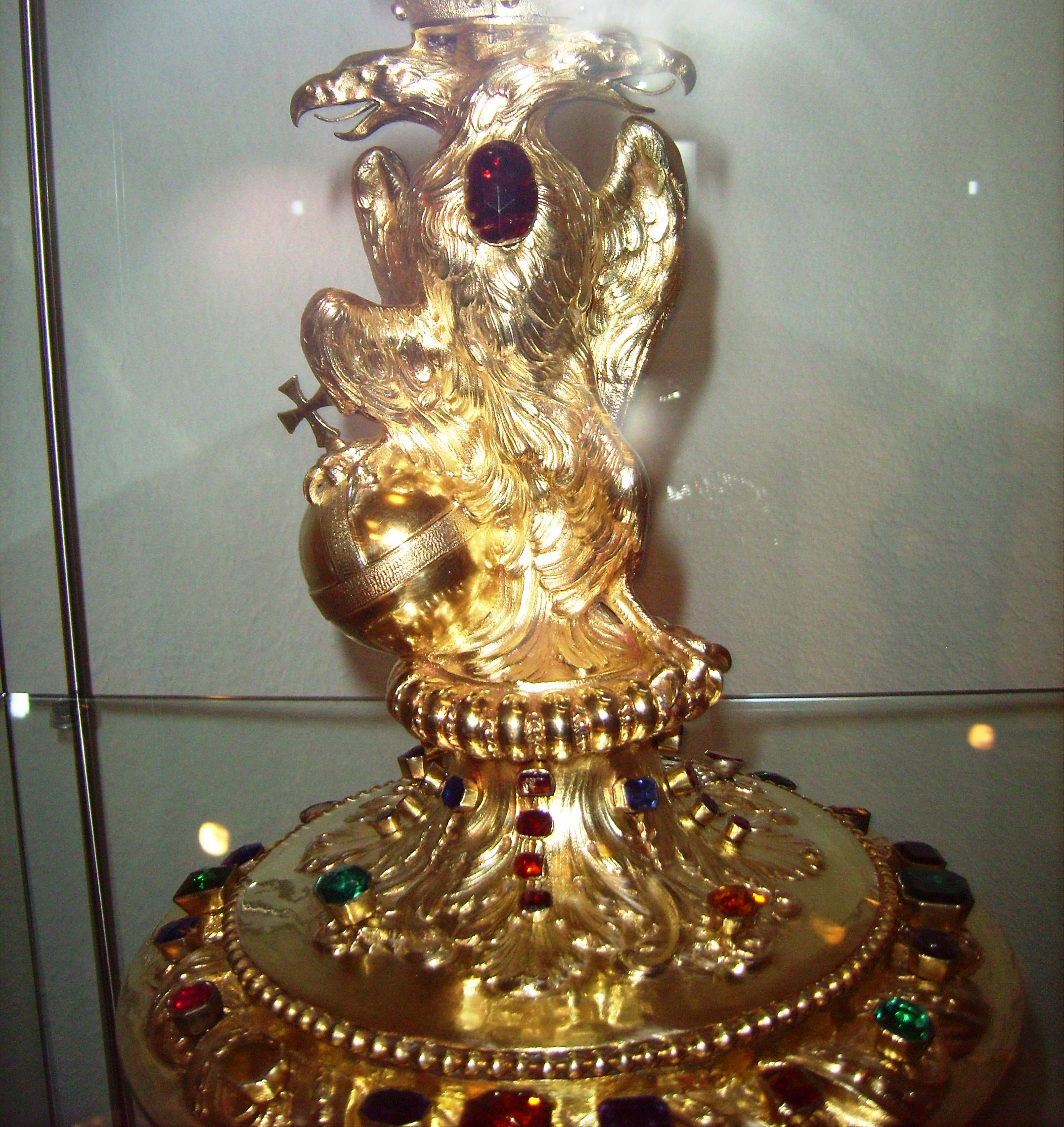 Detailansicht des Doppeladlers am Westfälischen Landständepokals